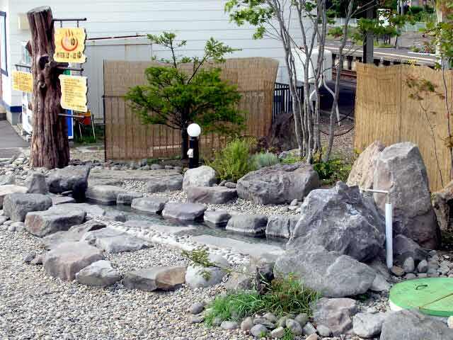 足湯。駅の横にある。ここに温泉が入っていて、足をつけて温まる。 撮影場所 摩周駅駅前広場